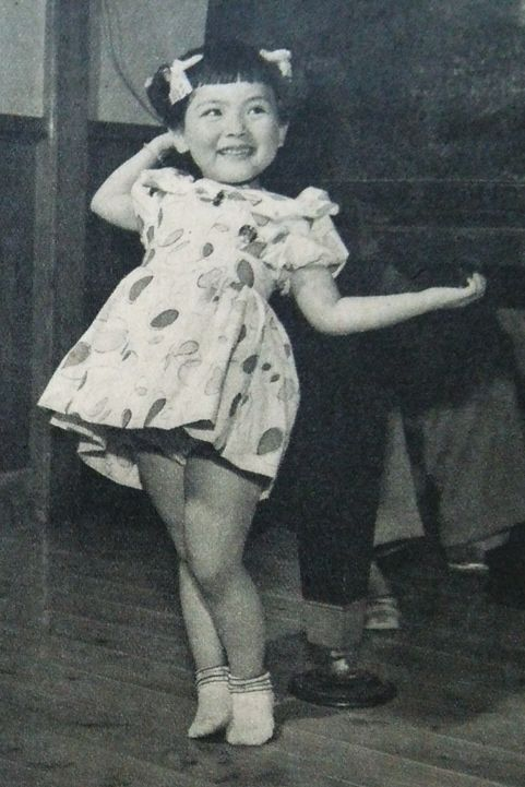 小鳩くるみ